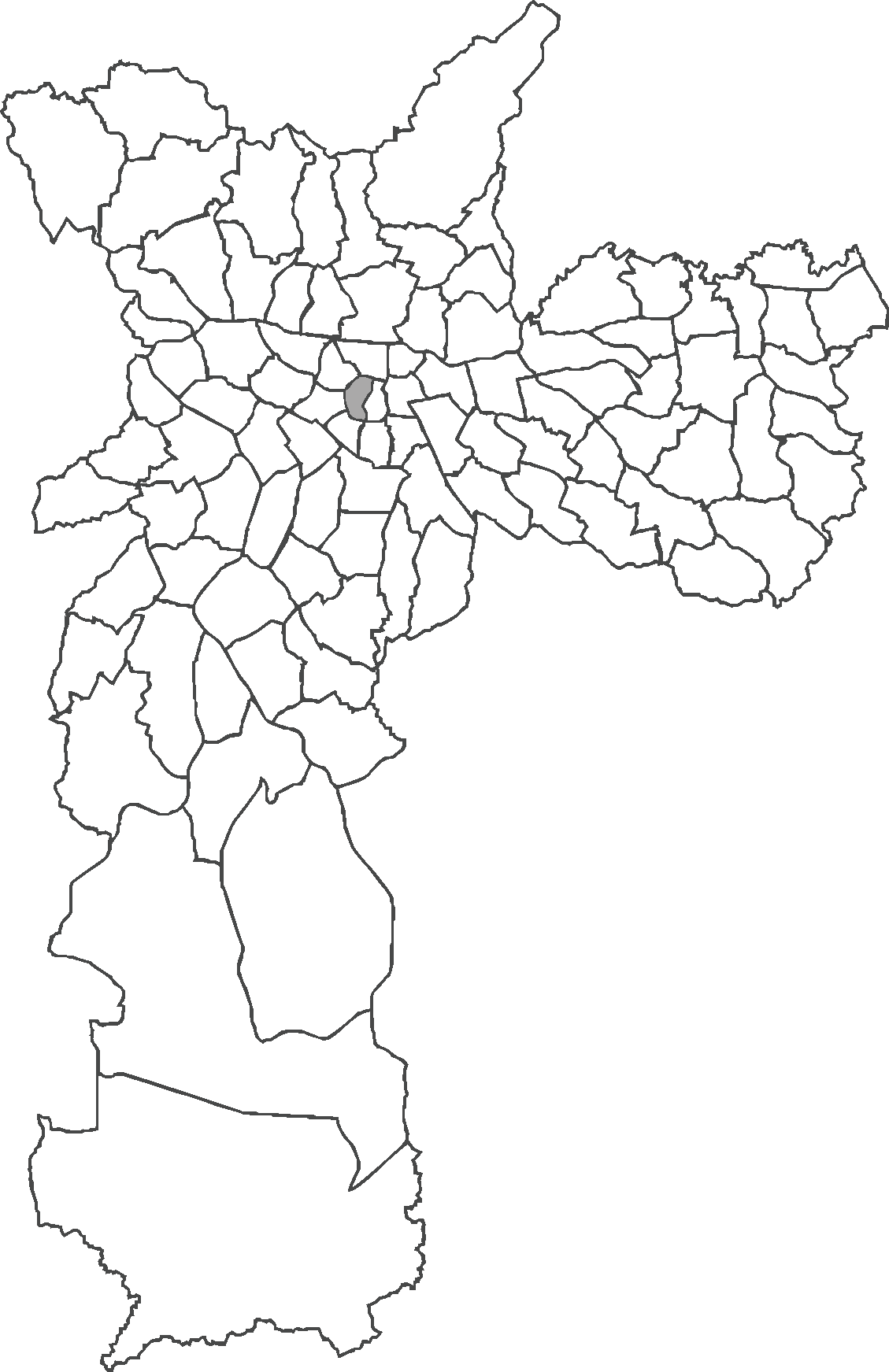 Localização do distrito da República no município de São Paulo.